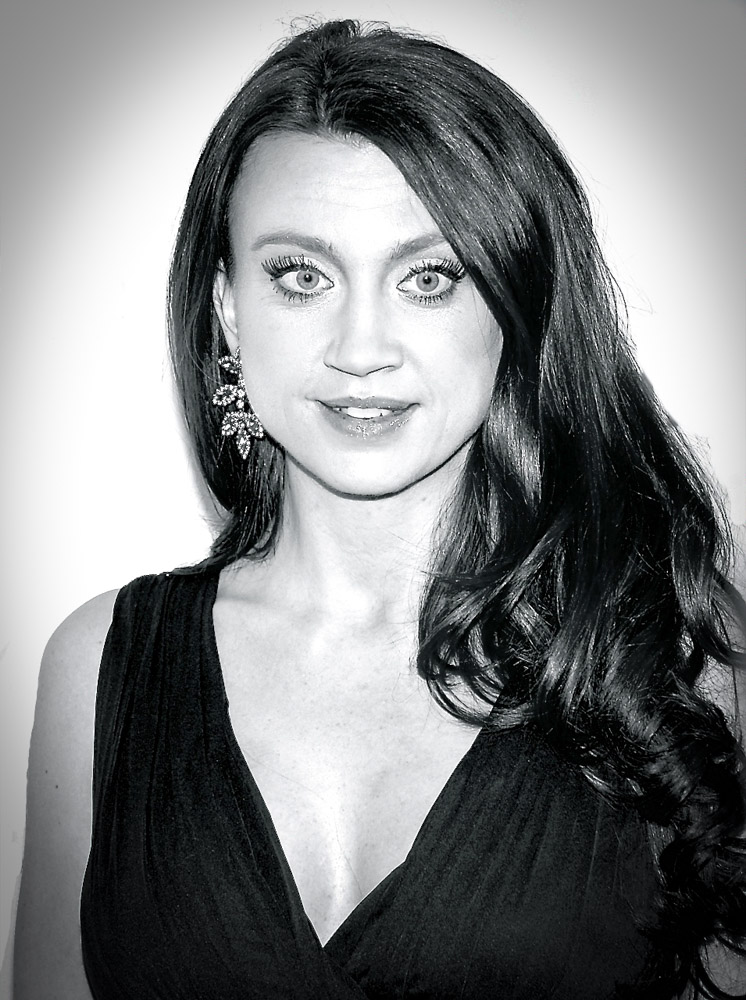 Camilla Läckberg på Guldbaggegalan 2013.